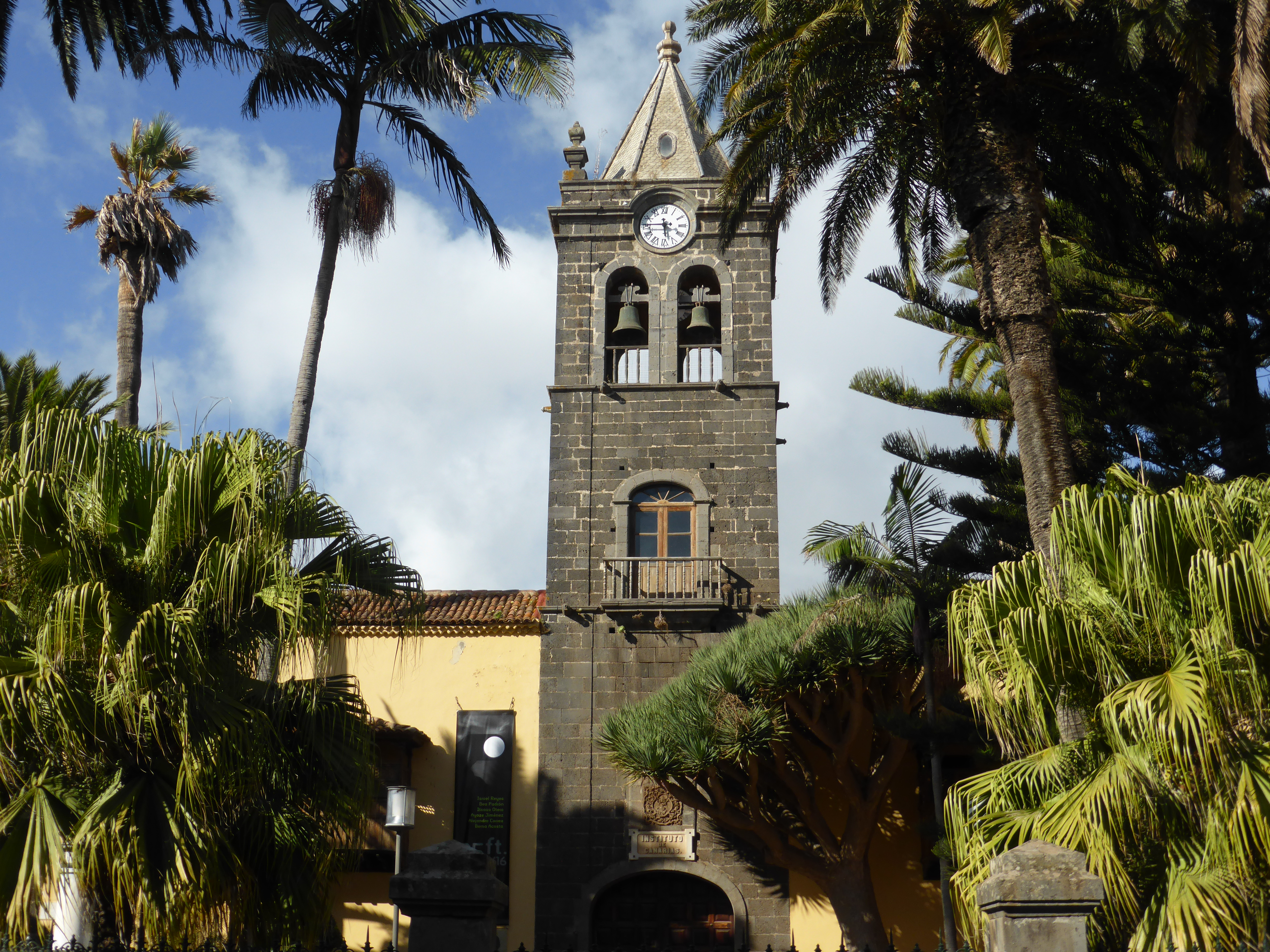 Torre del antiguo convento de San Agustín. A mediados del siglo XIX el convento fue reutilizado como sede del "Instituto de Canarias", hoy museo del "IES Canarias Cabrera Pinto". El Instituto Cabrera Pinto es un centro educativo público de la ciudad de La Laguna (o San Cristóbal de La Laguna). La torre está construida con piedra volcánica, de cantería, de basalto.